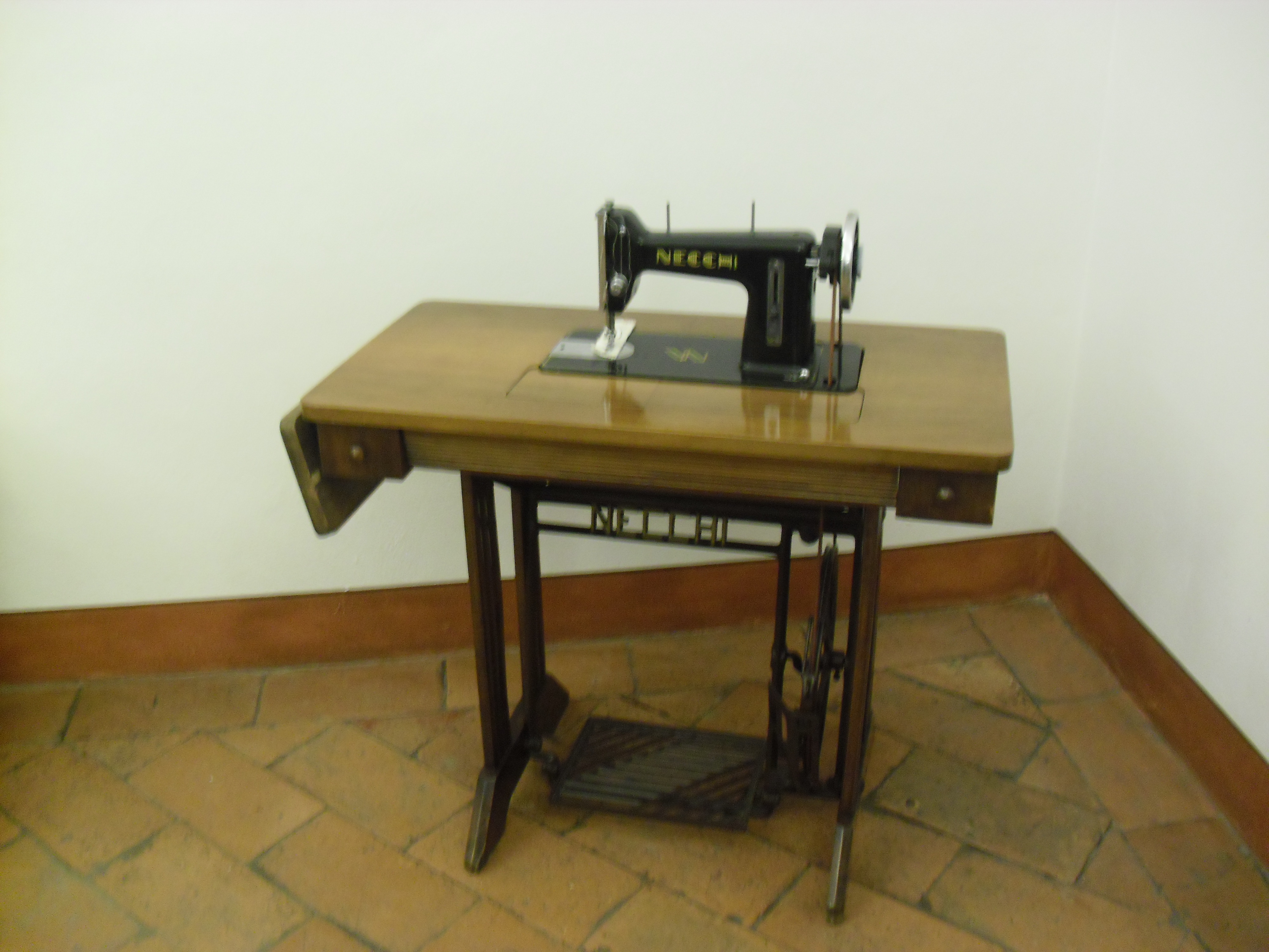 Museo Civico Goffredo Bellini di Asola (Mantova)